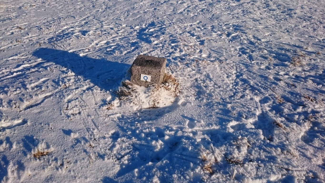 Borne IGN au sommet du Hohneck, commune de la Bresse (88)